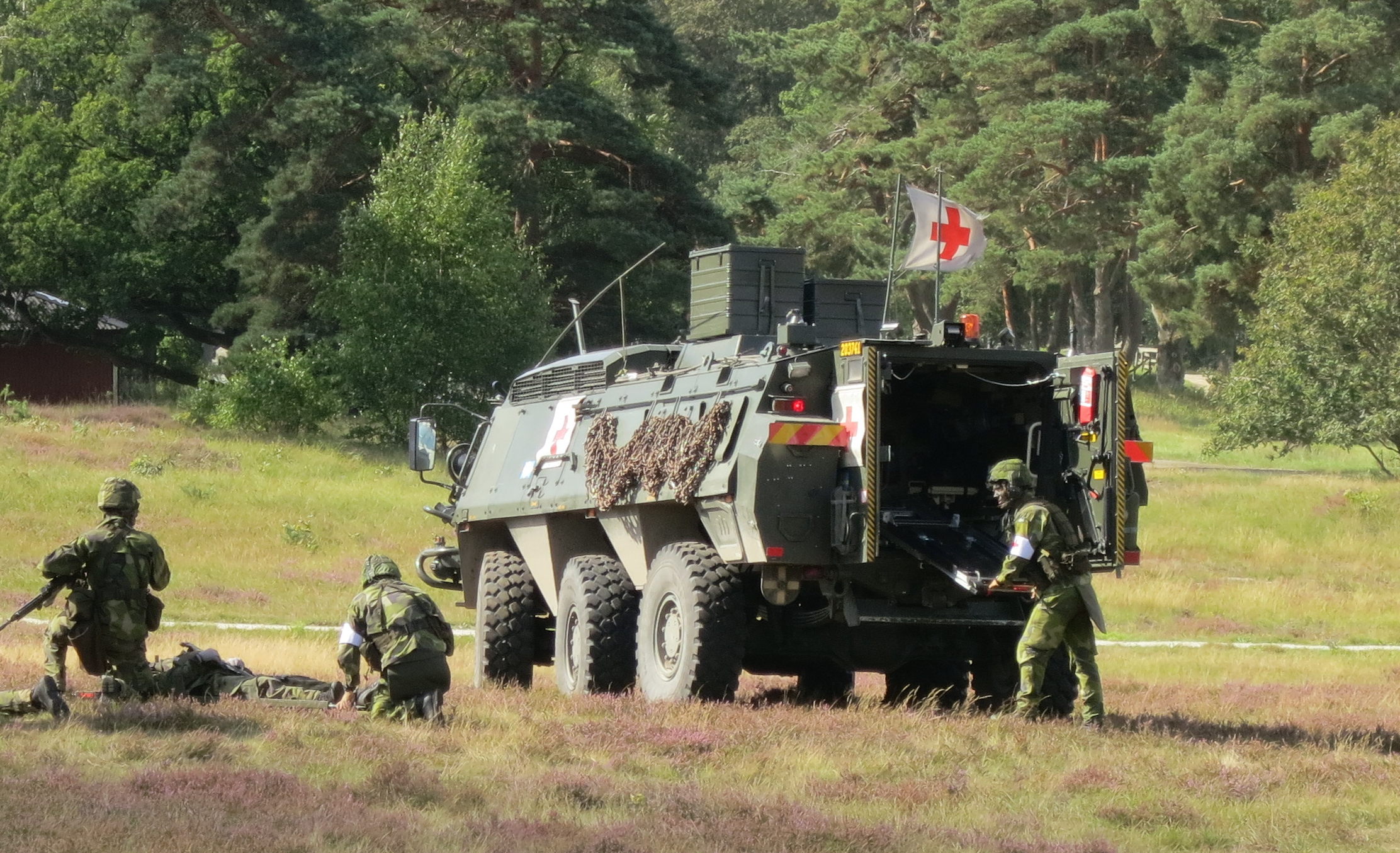 Pansarterrängbil 203 sjuktransport vid Regementets Dag på P7 Revingehed